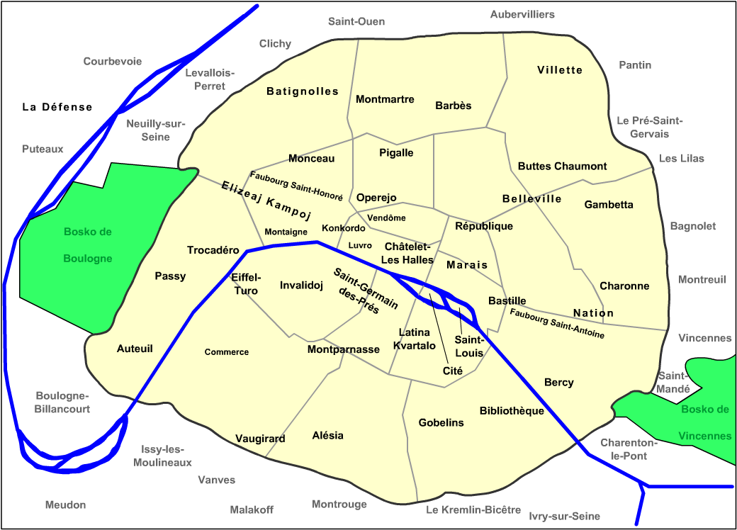 Kvartaloj de Parizo